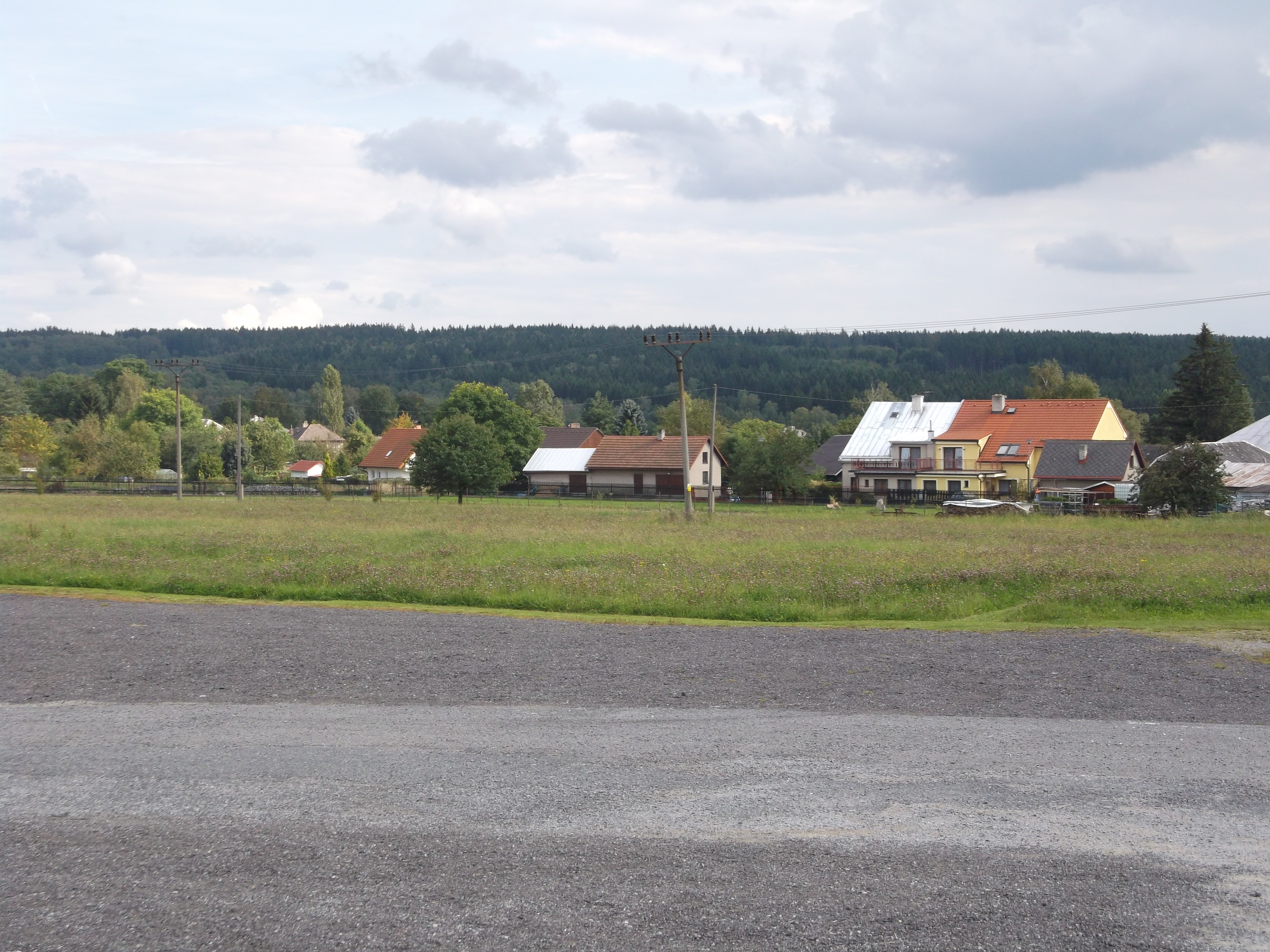 Medkovy Kopce - celkový pohled